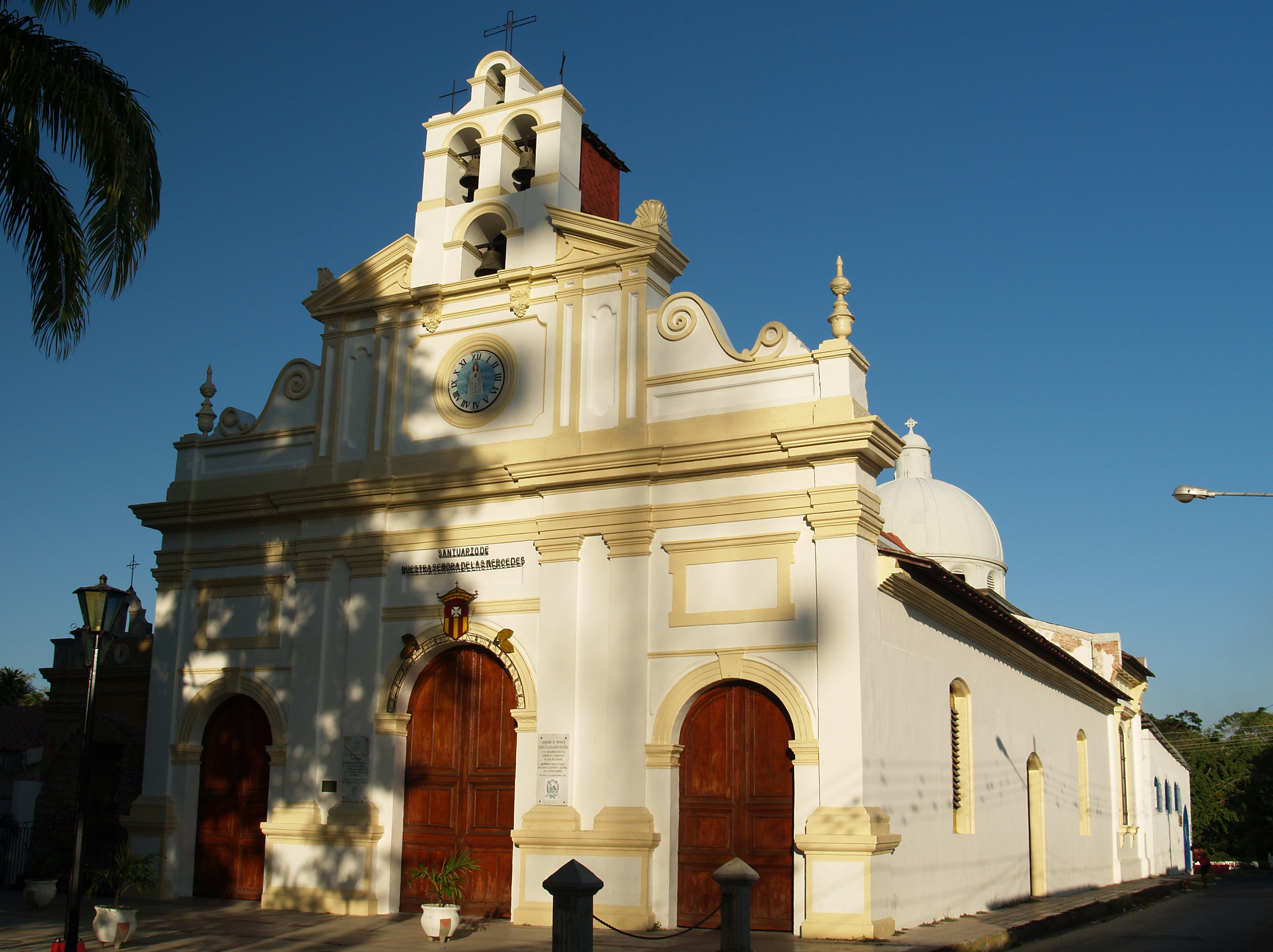 Santuario Nuestra Señora De Las Mercedes